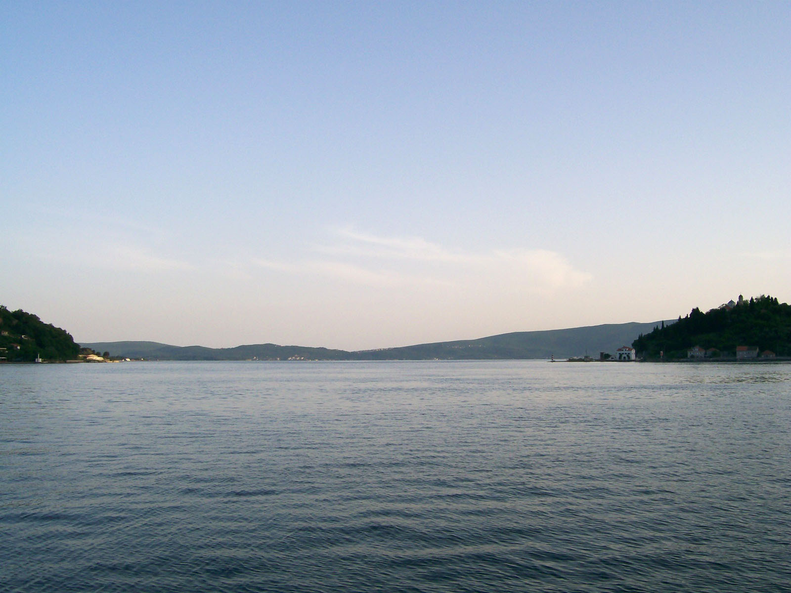 Boka kotorska - Tivatski zaljev